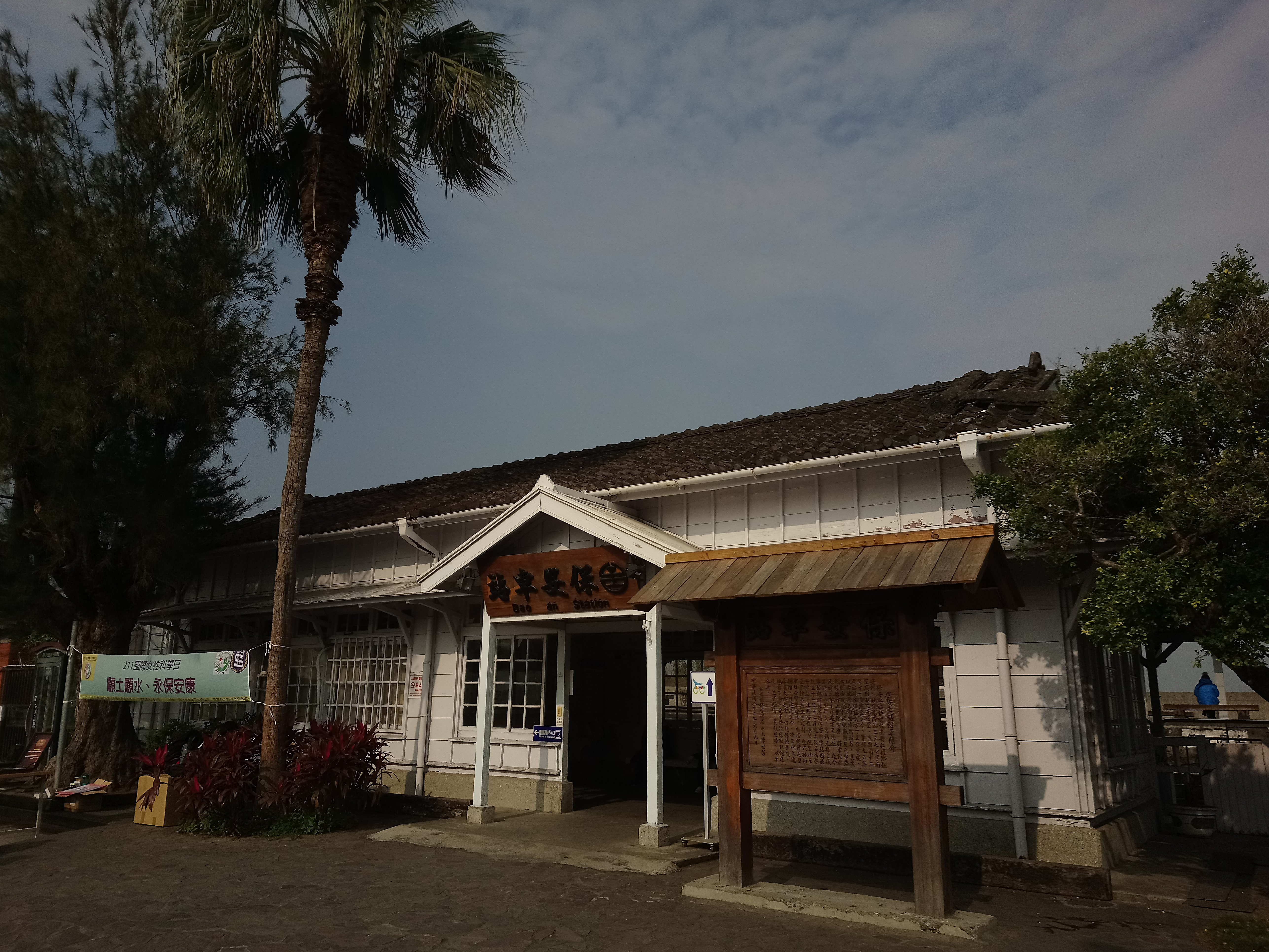 臺鐵保安車站,臺南市仁德區保安里